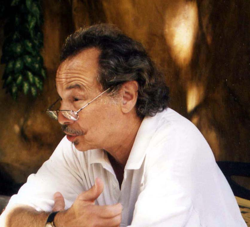 Abdelmajid Lakhal